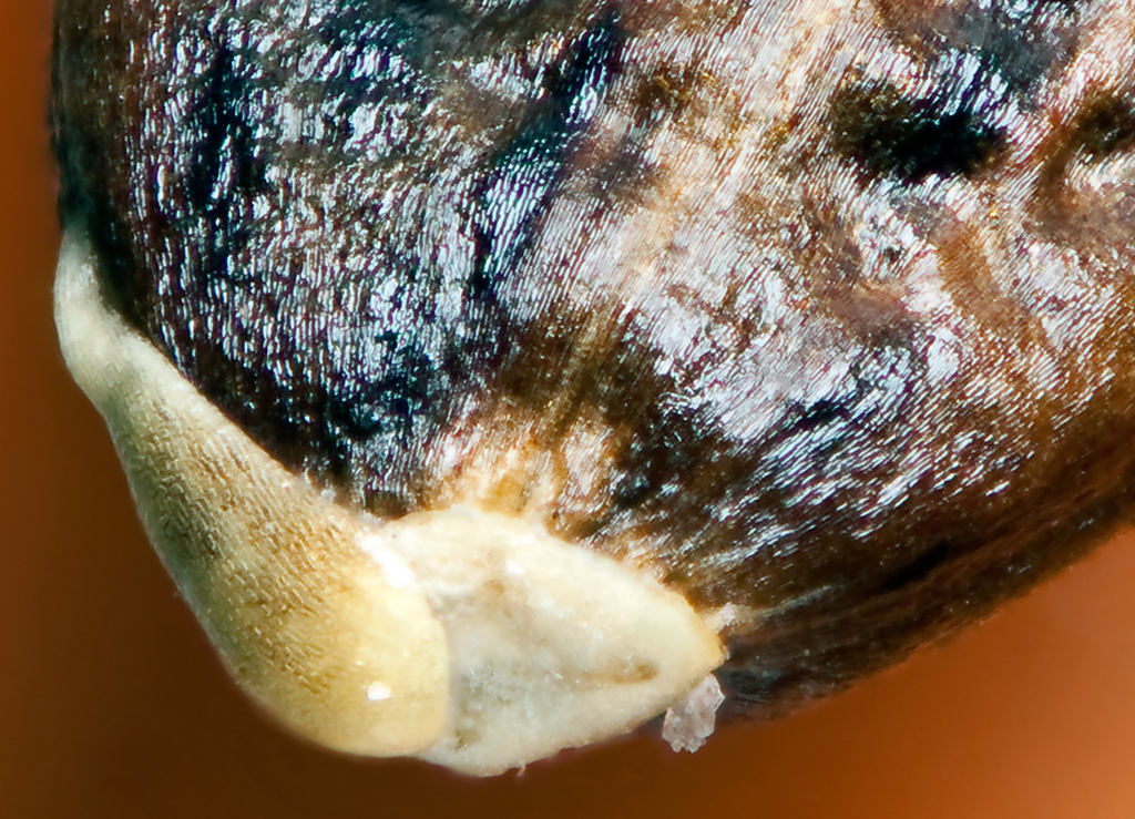 Onopordum acanthium - (Cardo borriquero, Toba) - Cipsela suelta: base con eleosoma.